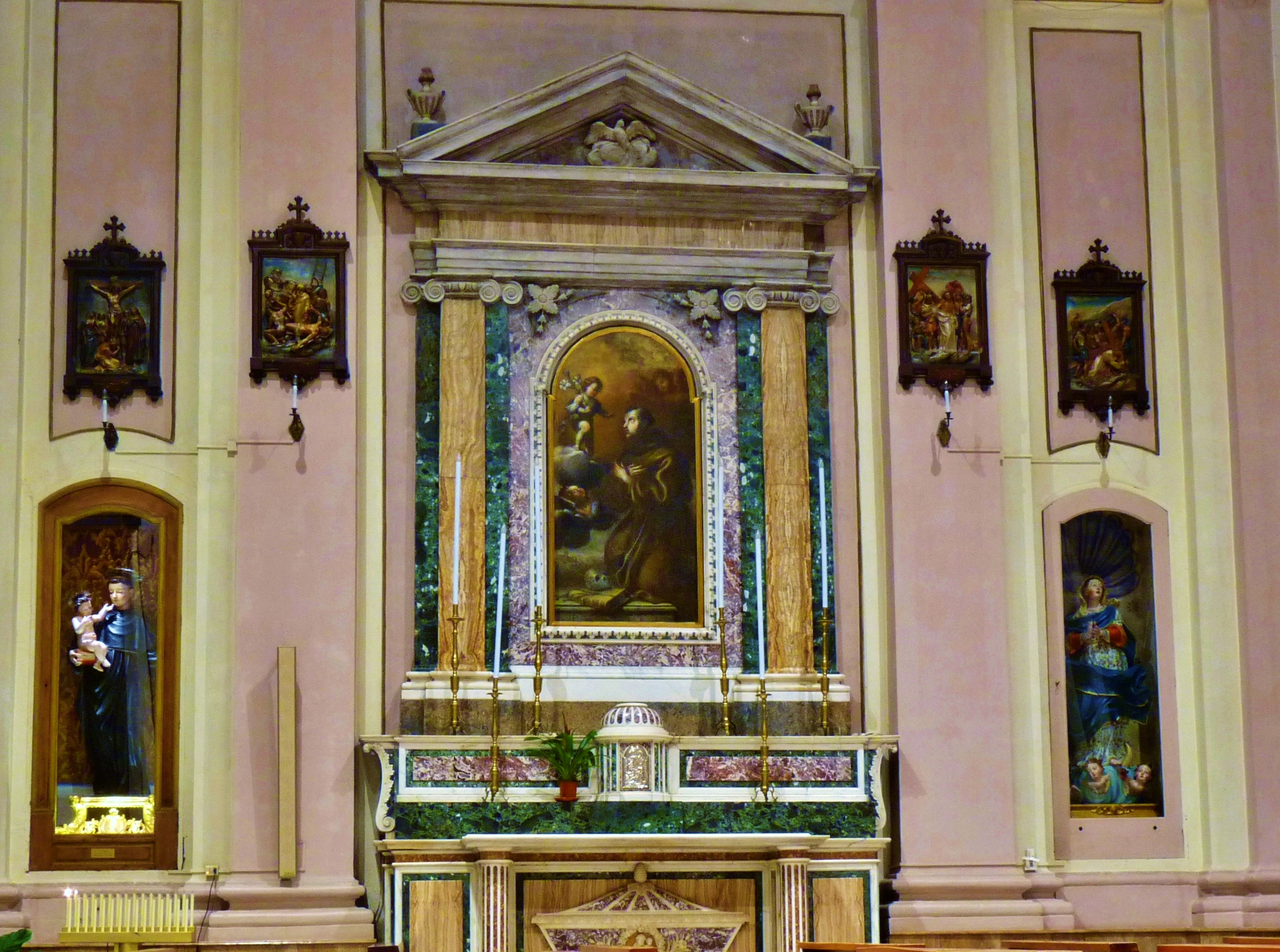 Altare dedicato a Sant'Antonio da Padova nella Collegiata Santissima Maria Assunta di Ceglie Messapica (BR), navata sinistra